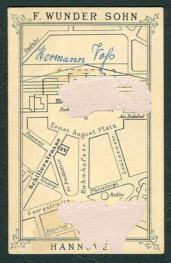 Rückseite der Carte de Visite mit einem skizzierten Stadtplan-Ausschnitt von Hannover und dem hervorgehobenen Standort des Fotoateliers von "F. Wunder Sohn" in der Schillerstraße 24. Auf der Skizze findet sich noch die alte "Umfuhr" hinter dem Hauptbahnhof und am Standort des heutigen Kröpcke der Hinweis auf das ursprüngliche "Café Robby".